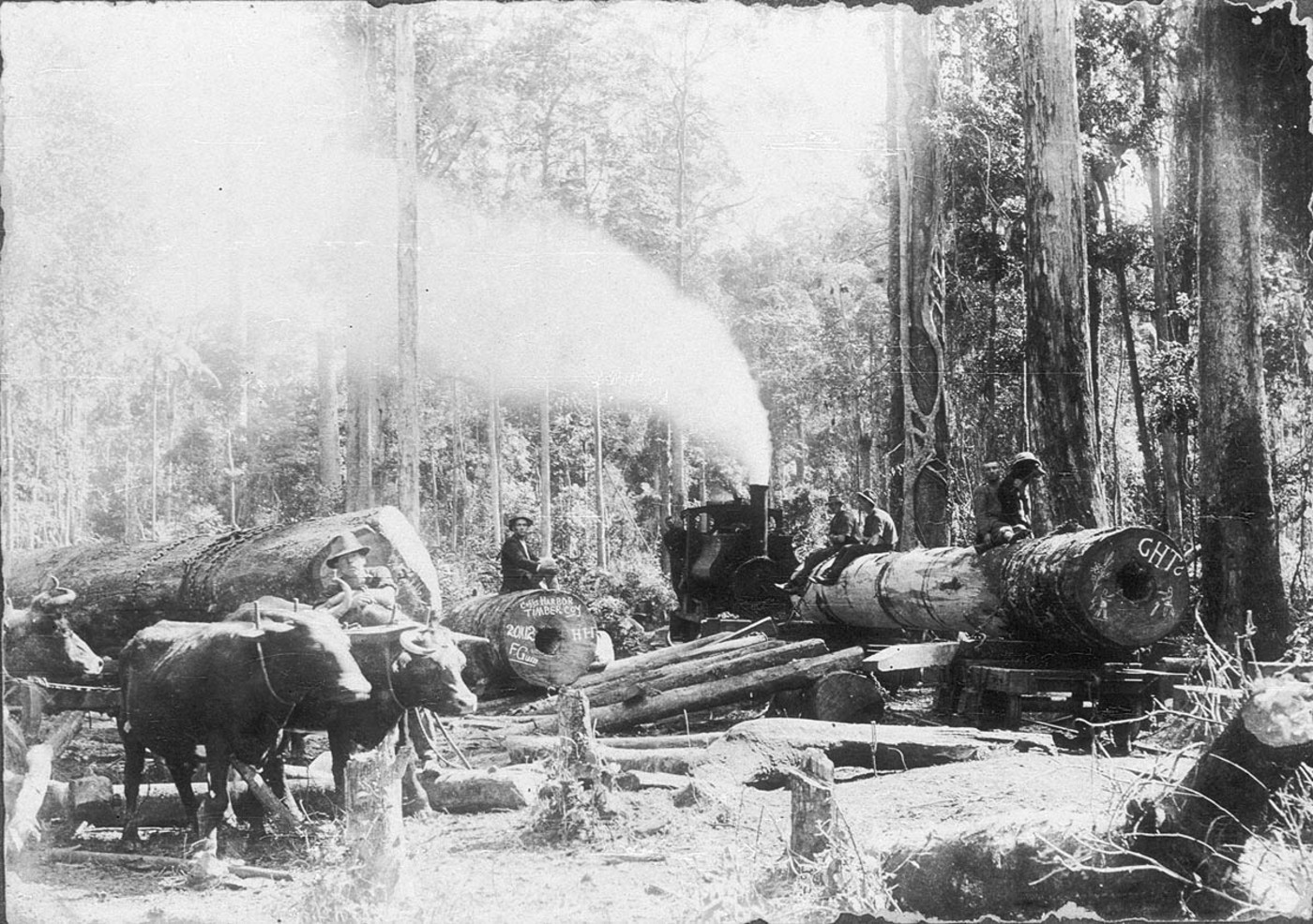 Coffs Harbour Timber Co.- Hurtle Hodgson's bullock team on Matt Singleton's property, transferring flooded gum logs onto the tramline to Coffs Harbour Timber Co. sawmill. The lead bullocks' names are "Bright" and "Lively" - Coffs Harbour, NSW2. Ex-Joadja locomotive, Bonville Line -- Information supplied by A.F. Watson (Nov 1989) Alphanumeric Designation: Original item no. BCP 01928 IE Number: IE1663257 At Work and Play - 01928